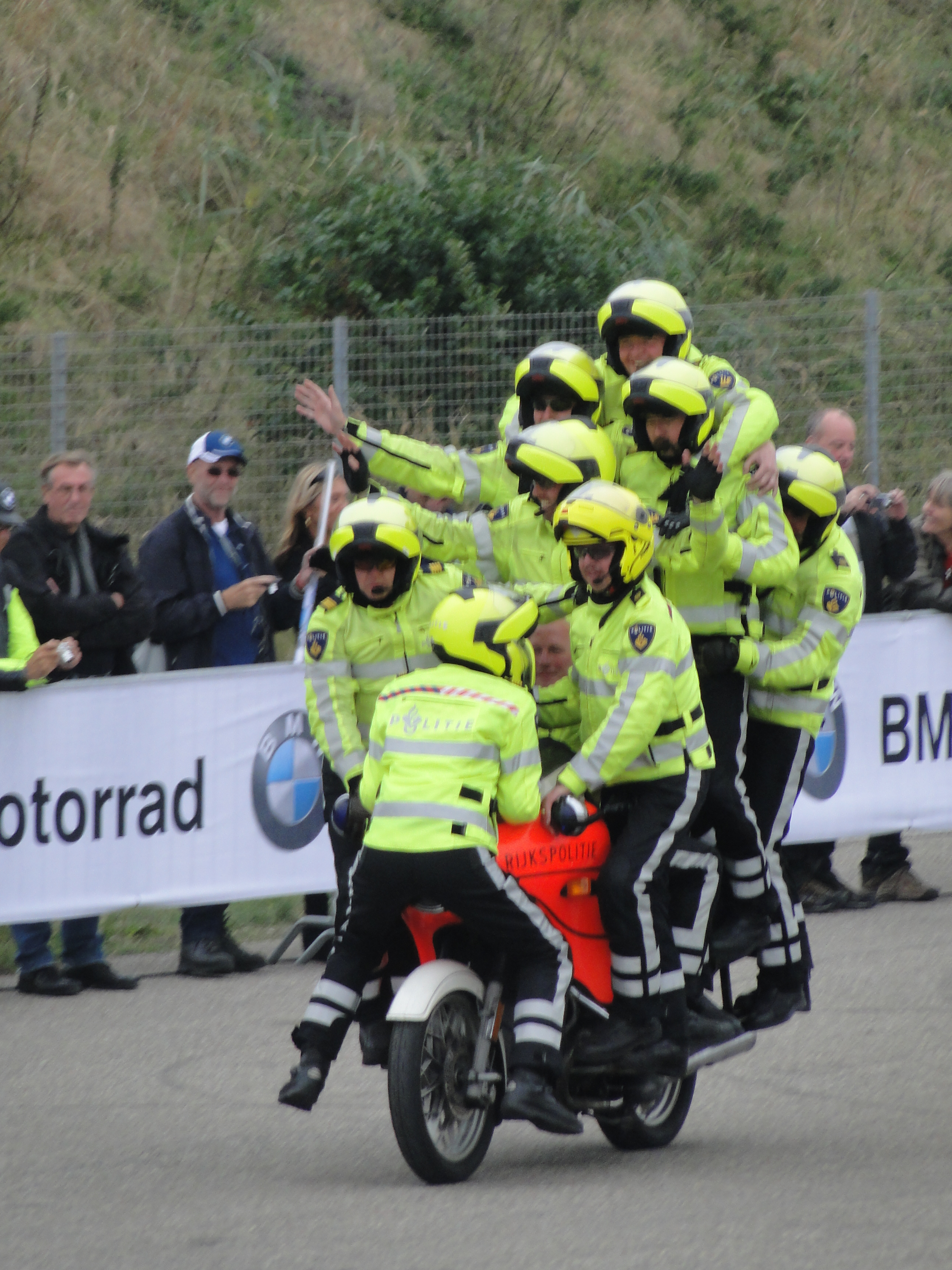 Op 22 september 2013, tijdens de BMW Motordagen op het Circuitpark Zandvoort, vond het tot nu toe laatste publieke optreden plaats van het demonstratieteam.